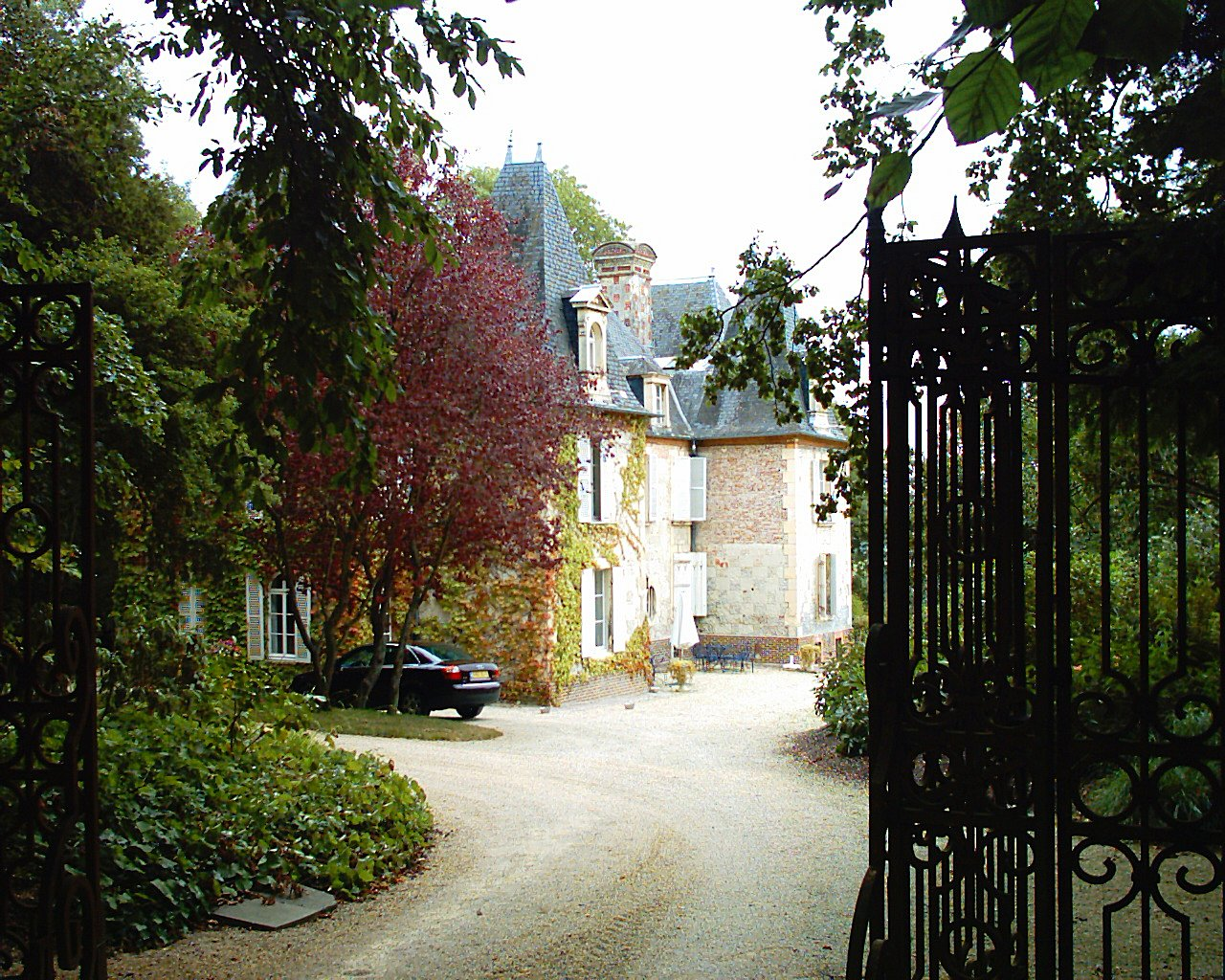 Chateau de Dramard, Gonneville-sur-Mer, Calvados in spring 2004.